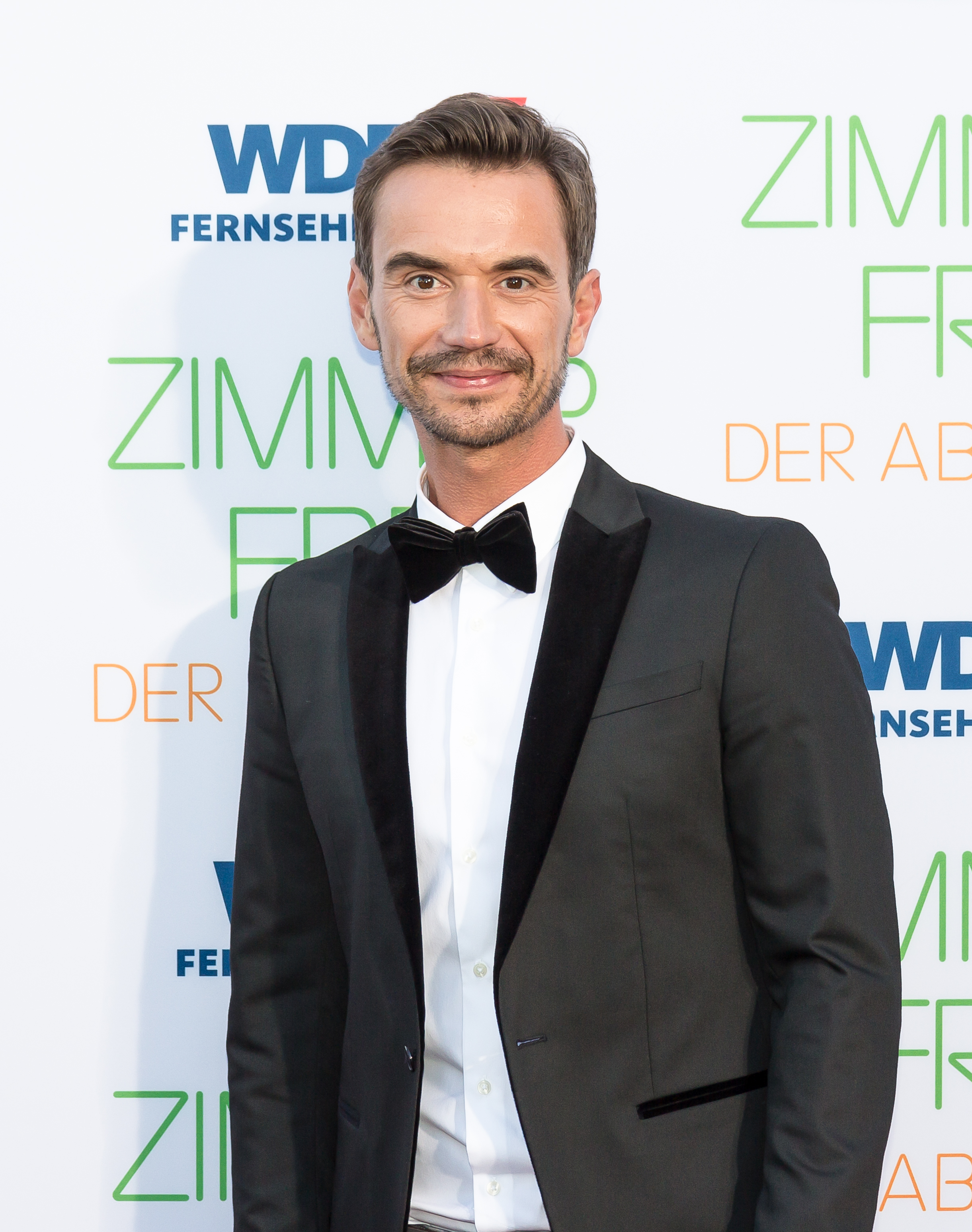 Zimmer frei - der Abschied Foto: Florian Silbereisen